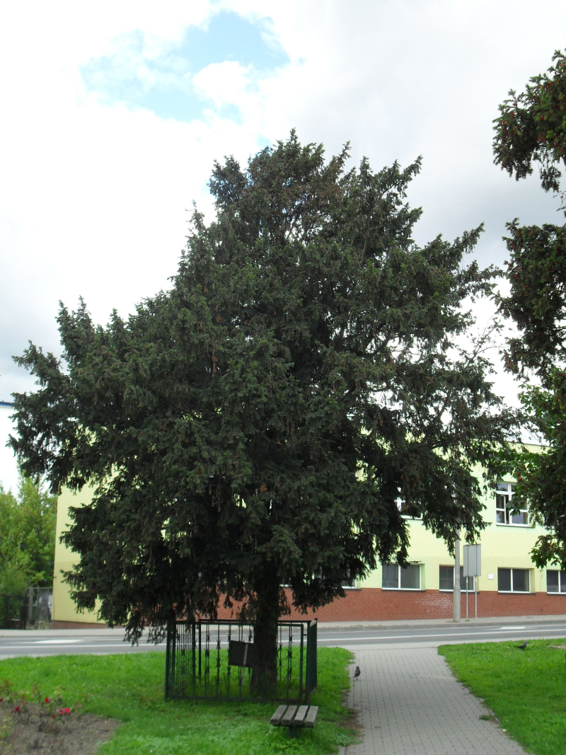 Pomnik przyrody cis pospolity Adam 105 cm obwodu na skwerze na rogu A Mickiewicza/Wojska Polskiego.